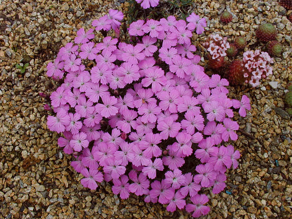 Plante endémique de la Turquie, de 5 à 8 cm, que l'on trouve sur éboulis et rochers entre 1900 et 2500 m. (Photo en culture)